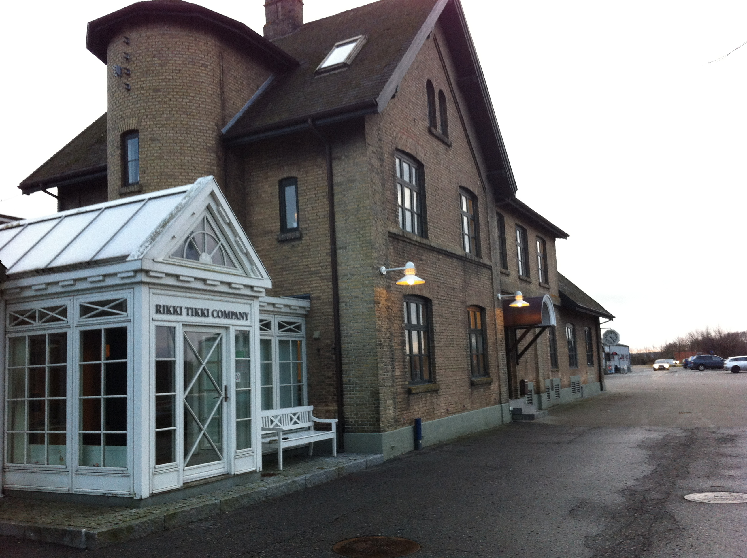 Hadsund Syd Station set mod vest. Bygningen ejes i dag af virksomheden Rikki Tikki.